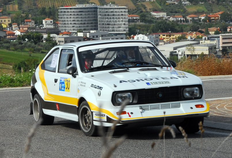 immagine della rara Skoda RS impegnata in una prova speciale del rally Legend 2014 a San Marino